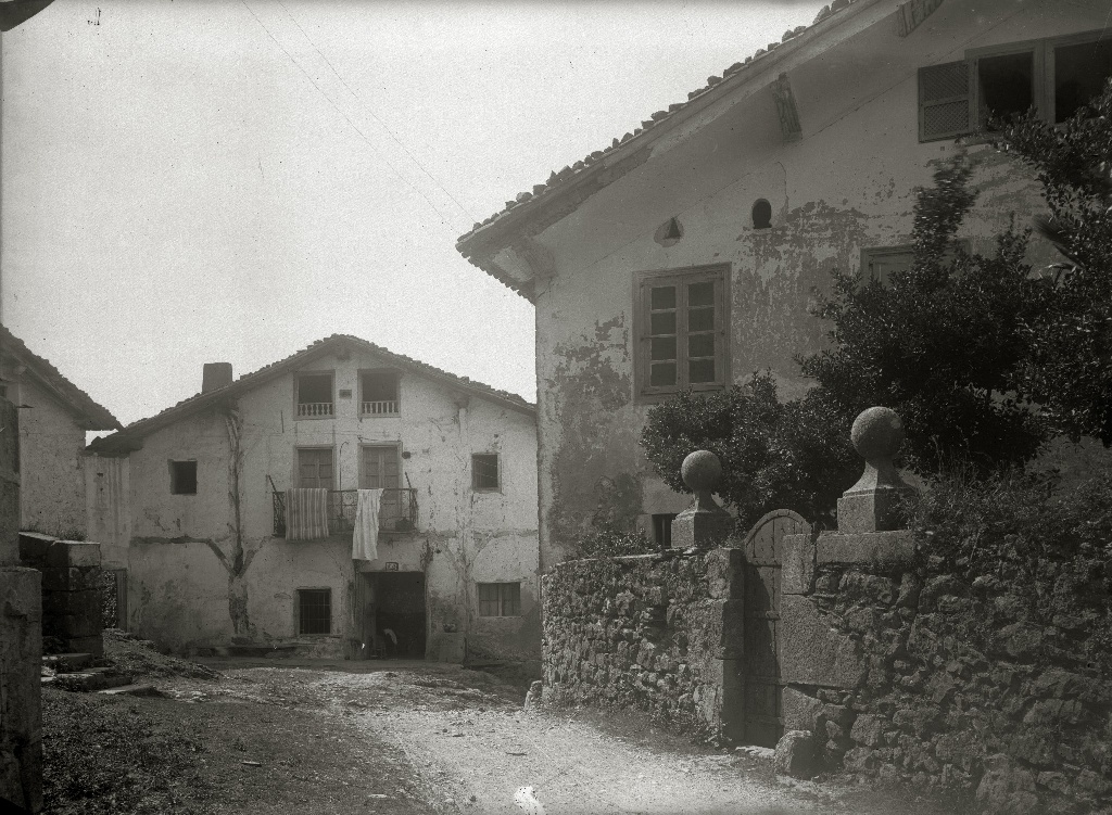 Título original: Barrio Elizmendi de la localidad de Asteasu (1/1) Localización: Asteasu (Guipúzcoa)